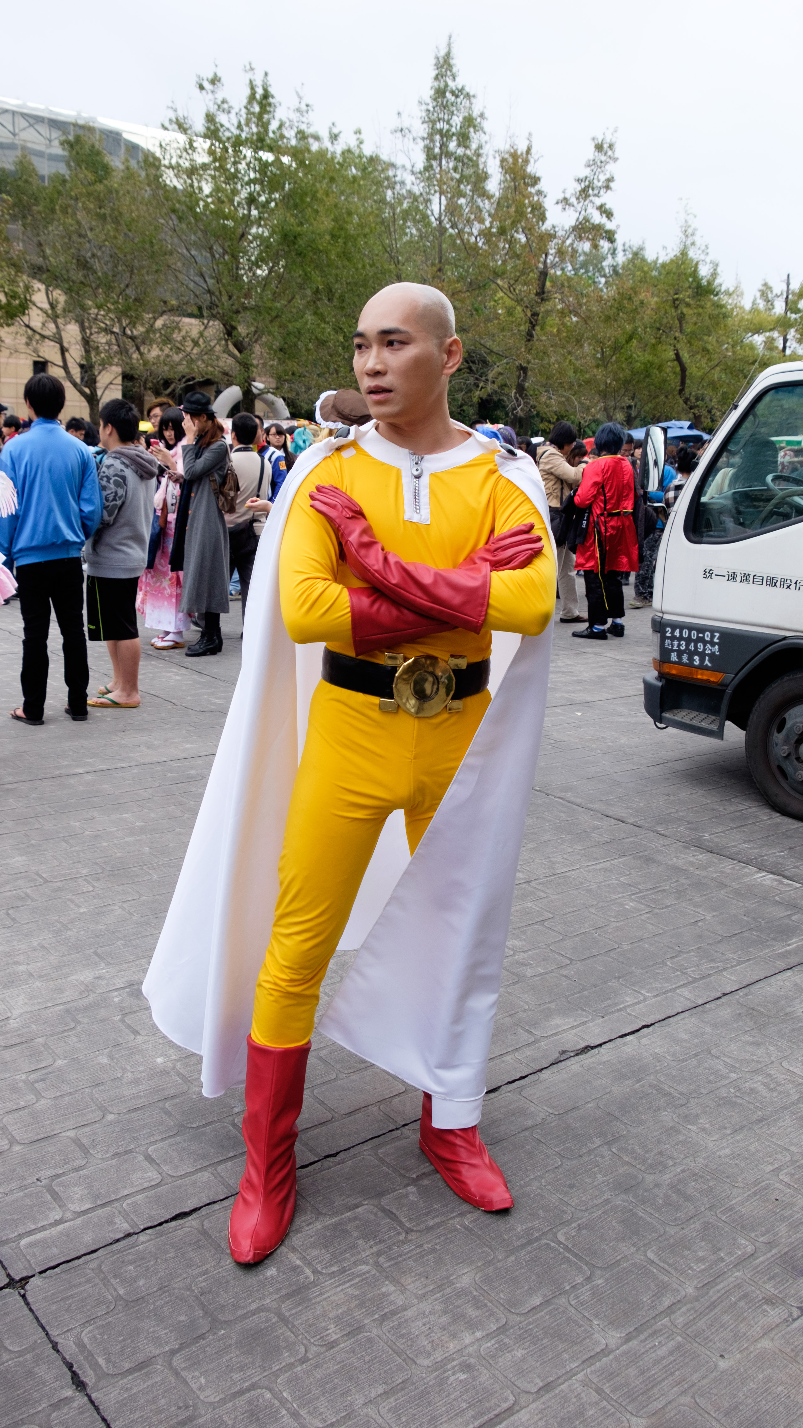 CWT41第一日下午，＜ワンパンマン＞サイタマcosplayer。